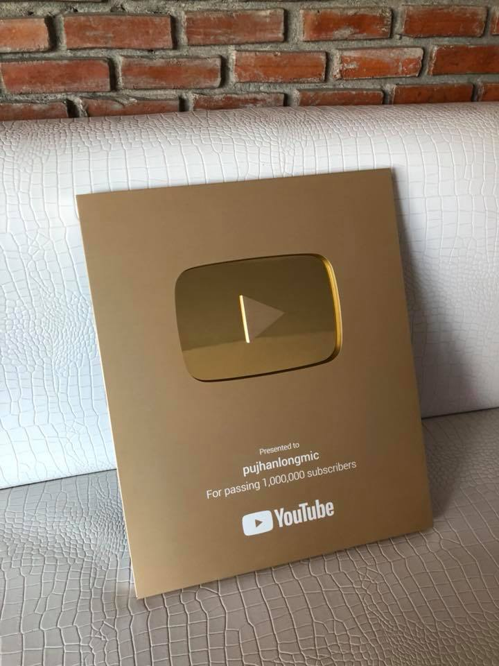 โล่ทองยูทูบ ของปู่จ๋านลองไมค์